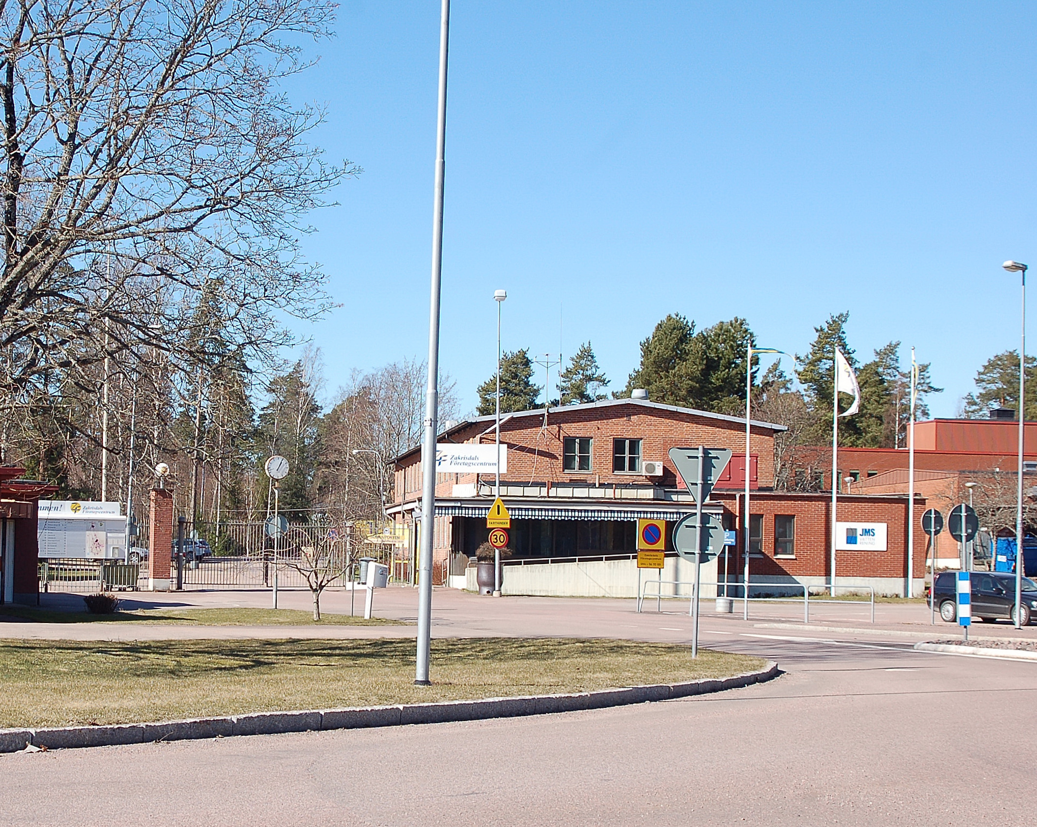 Huvudentre till Zakrisdals industriområde Karlstad